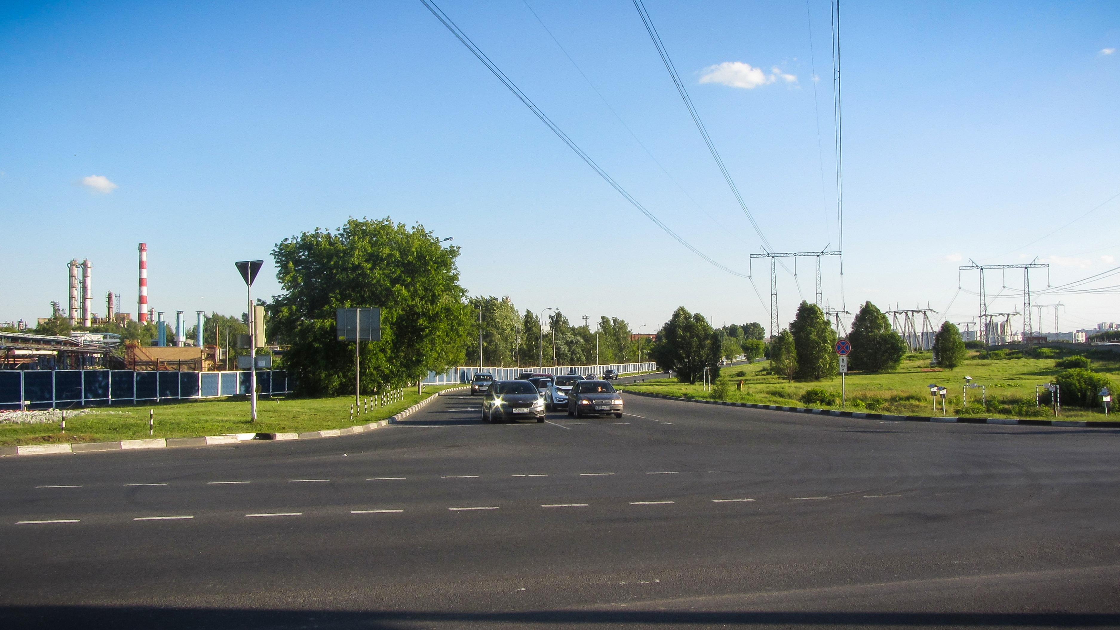 Улица Капотня на пересечении с ул. Верхние Поля